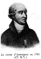 picture of Emmanuel-Louis-Henri de Launay, comte d'Antraigues - (1753-1812)